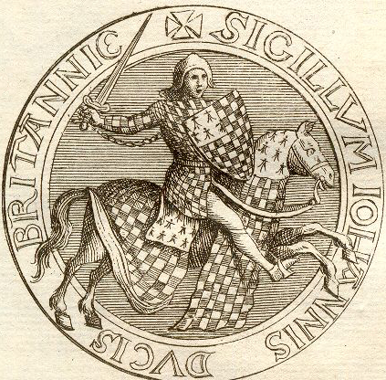 Détail du sceau du Duc Jean II de Bretagne : File:Jean II de Bretagne.jpg